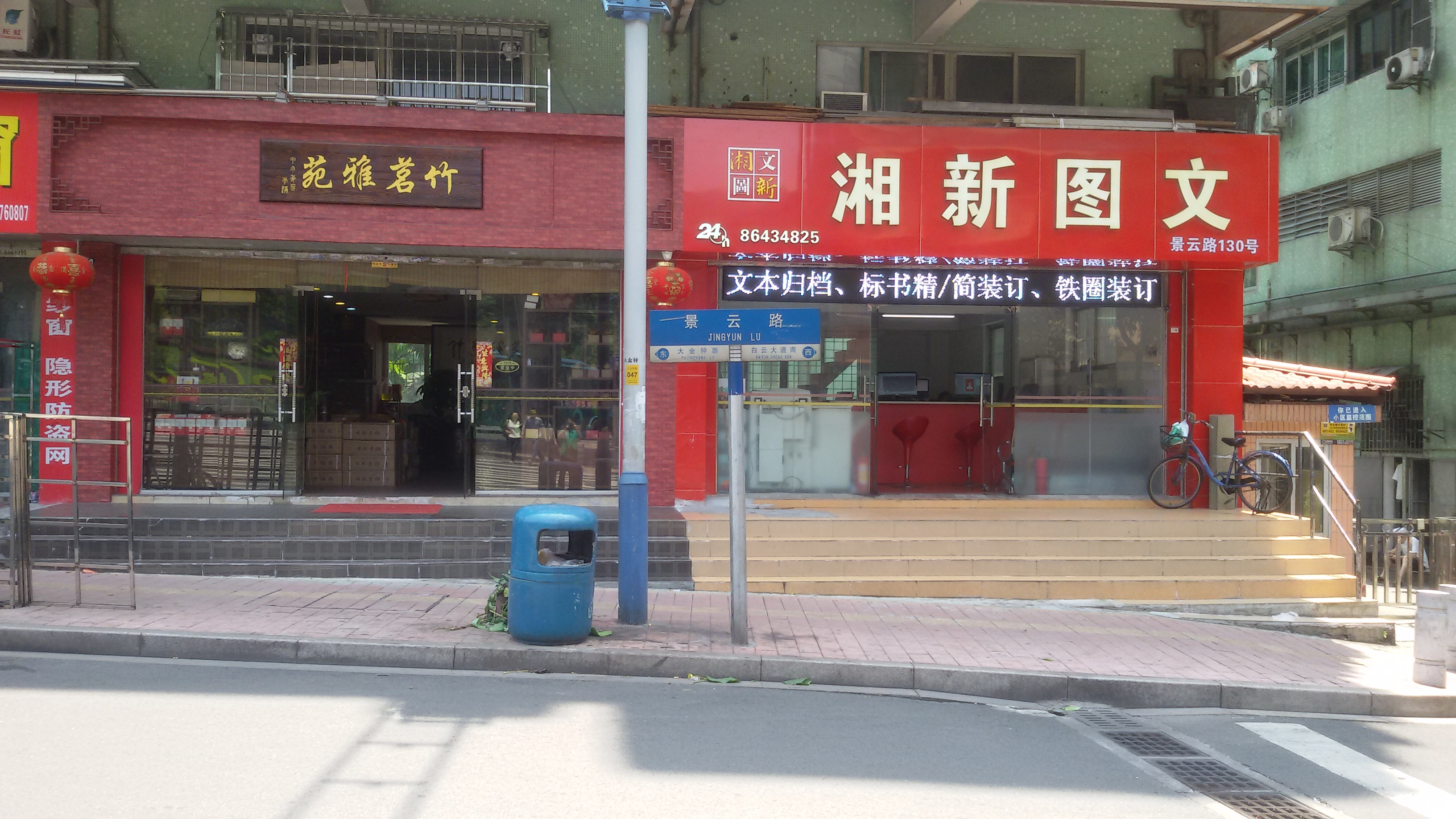 粵語: 景云路嘅路牌